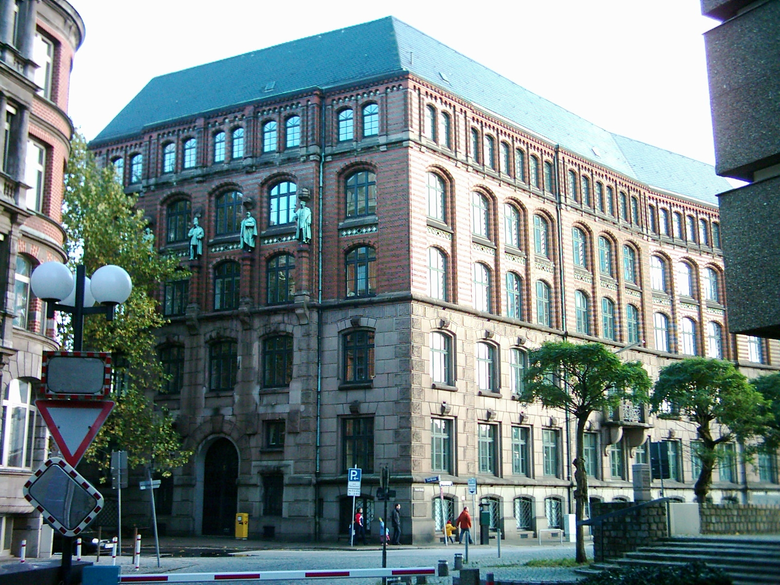 Laeisz-Hof, Kontorhaus von 1897, Hamburg-Altstadt.This is a photograph of an architectural monument.